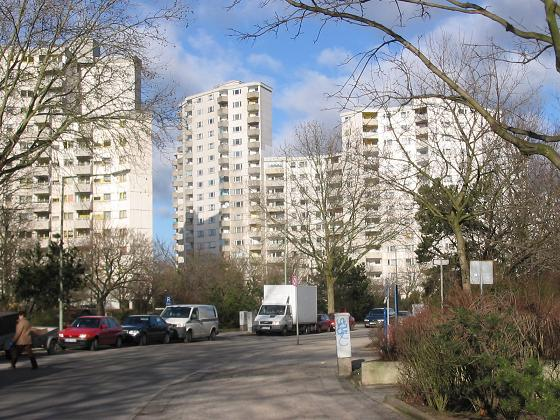 Märkisches Viertel, Berlin, Senftenberger Ring